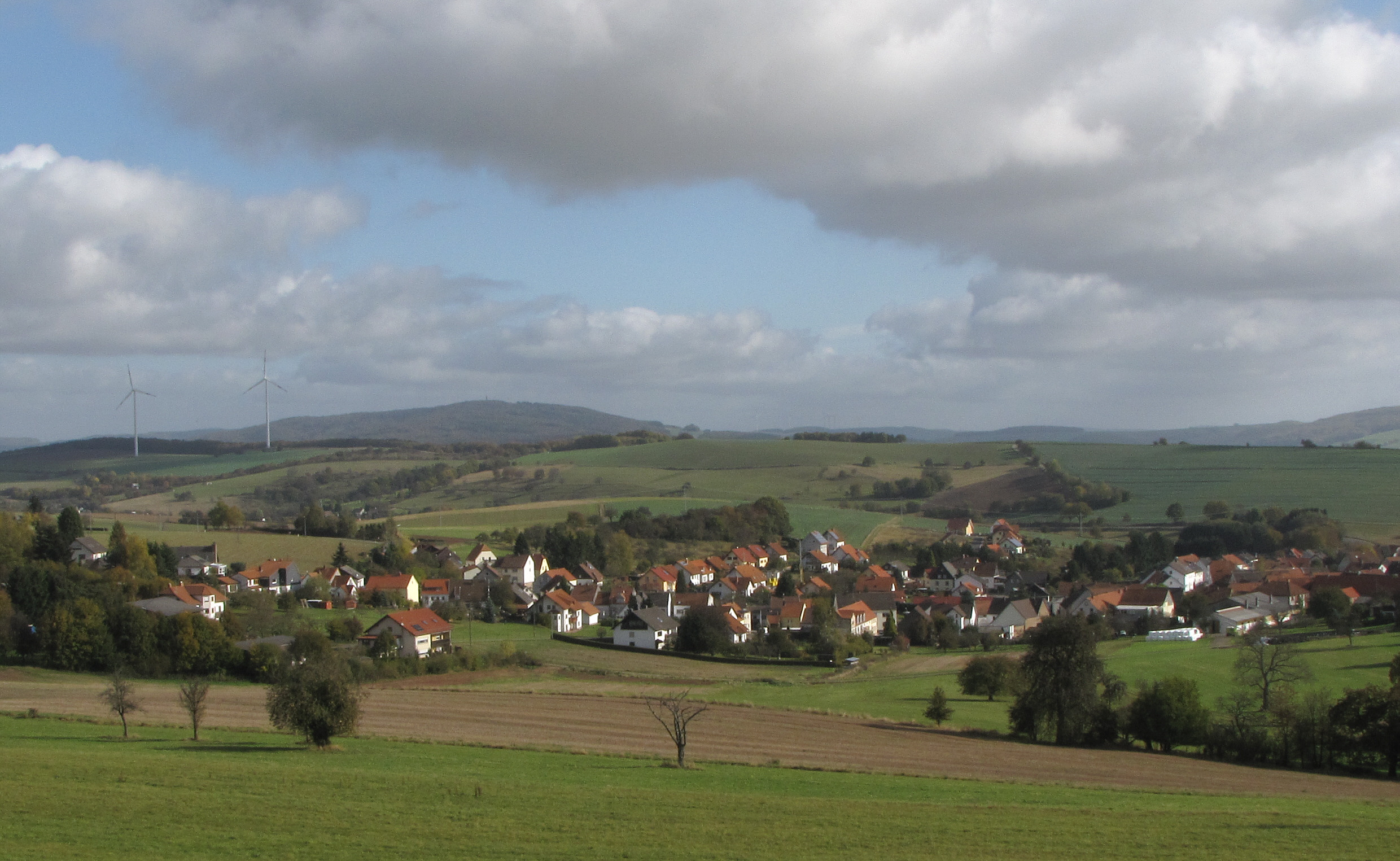 Blick auf den Ort Wahnwegen (Kreis Kusel)